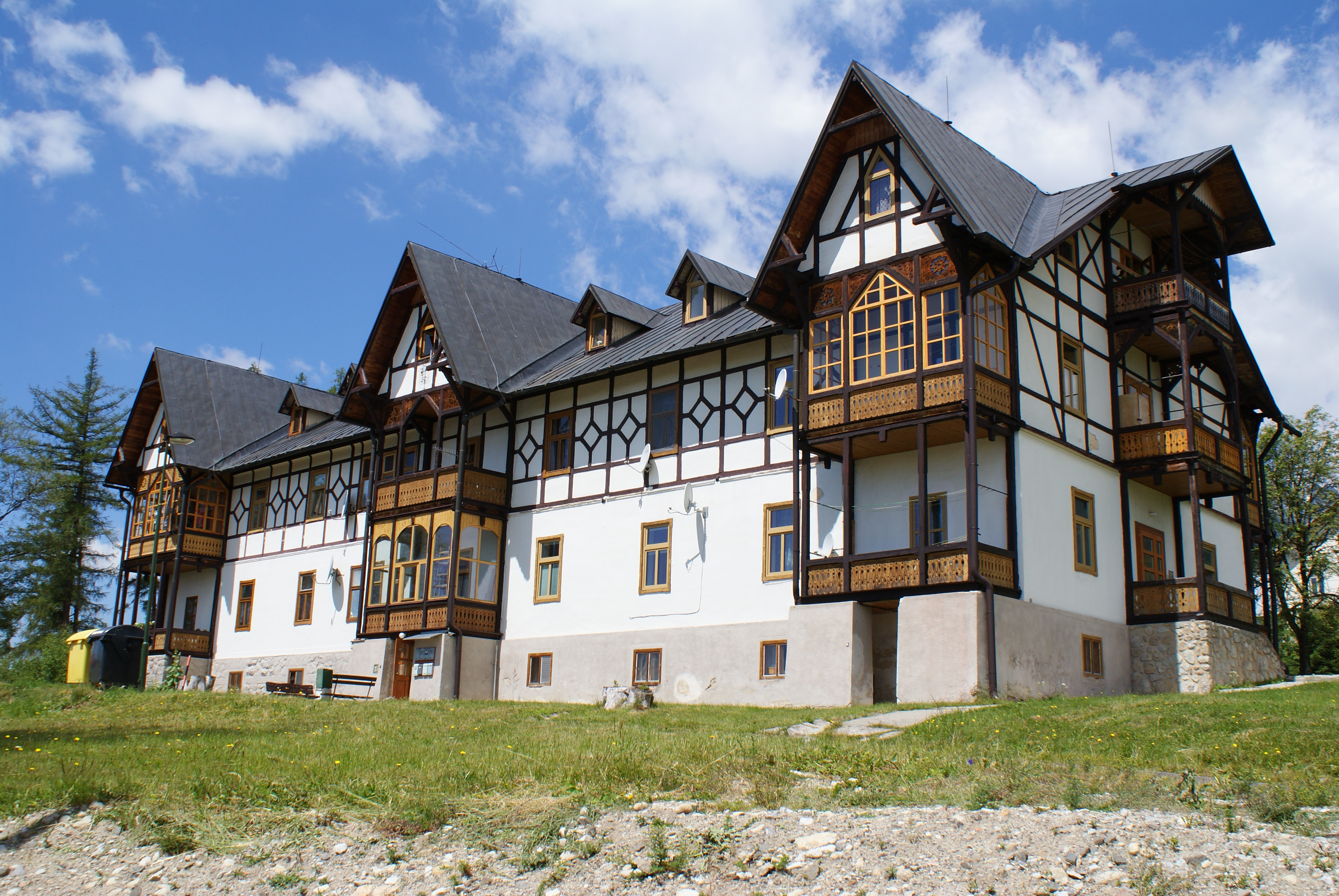 Národná kultúrna pamiatka